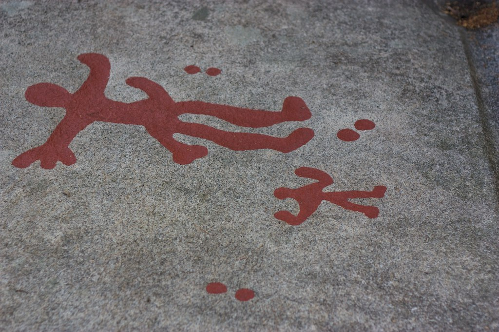 Helleristningar frå Begby-feltet i Østfold